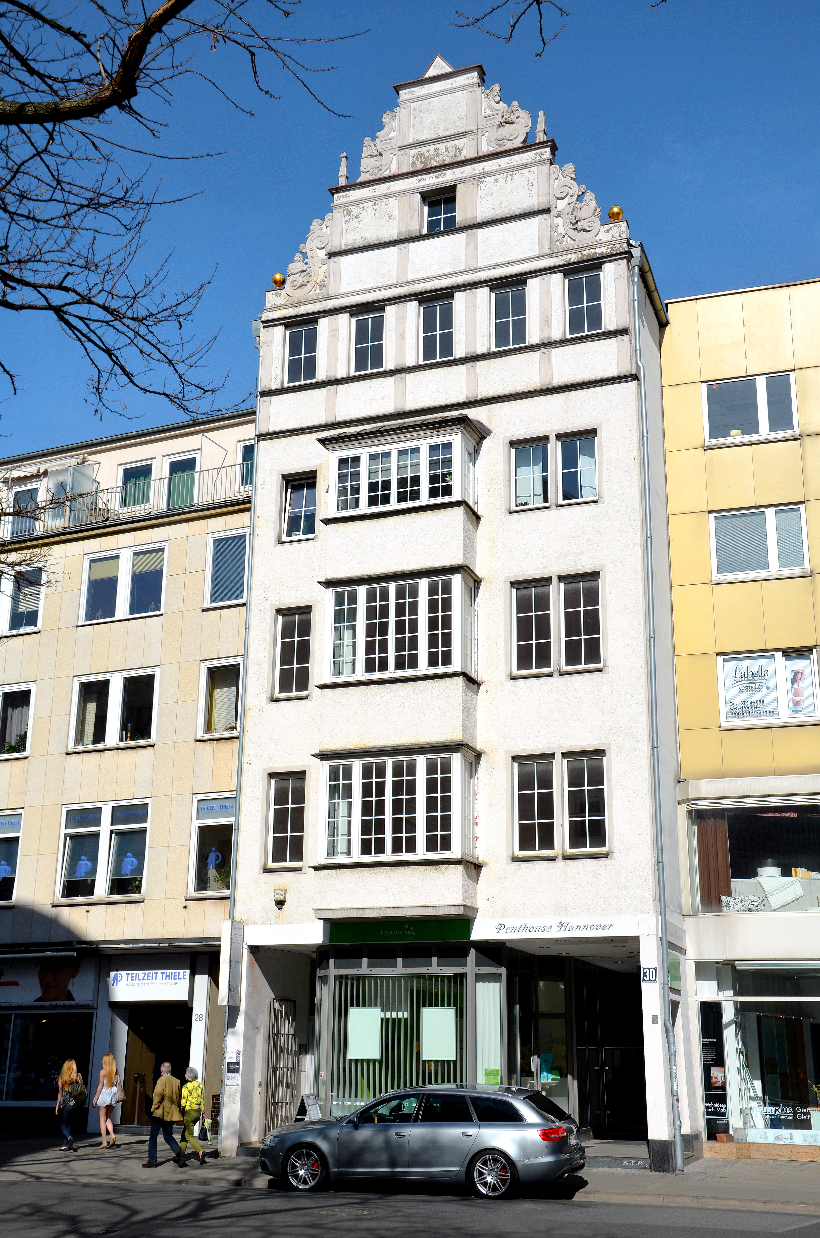 Blick von der Ecke Röselerstraße auf das denkmalgeschützte Gebäude Osterstraße 30 in Hannover mit originalen Teilen der Bauplastiken des Vorgängergebäudes von 1611 ...